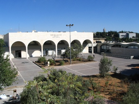 ישיבת חברון גבעת מרדכי